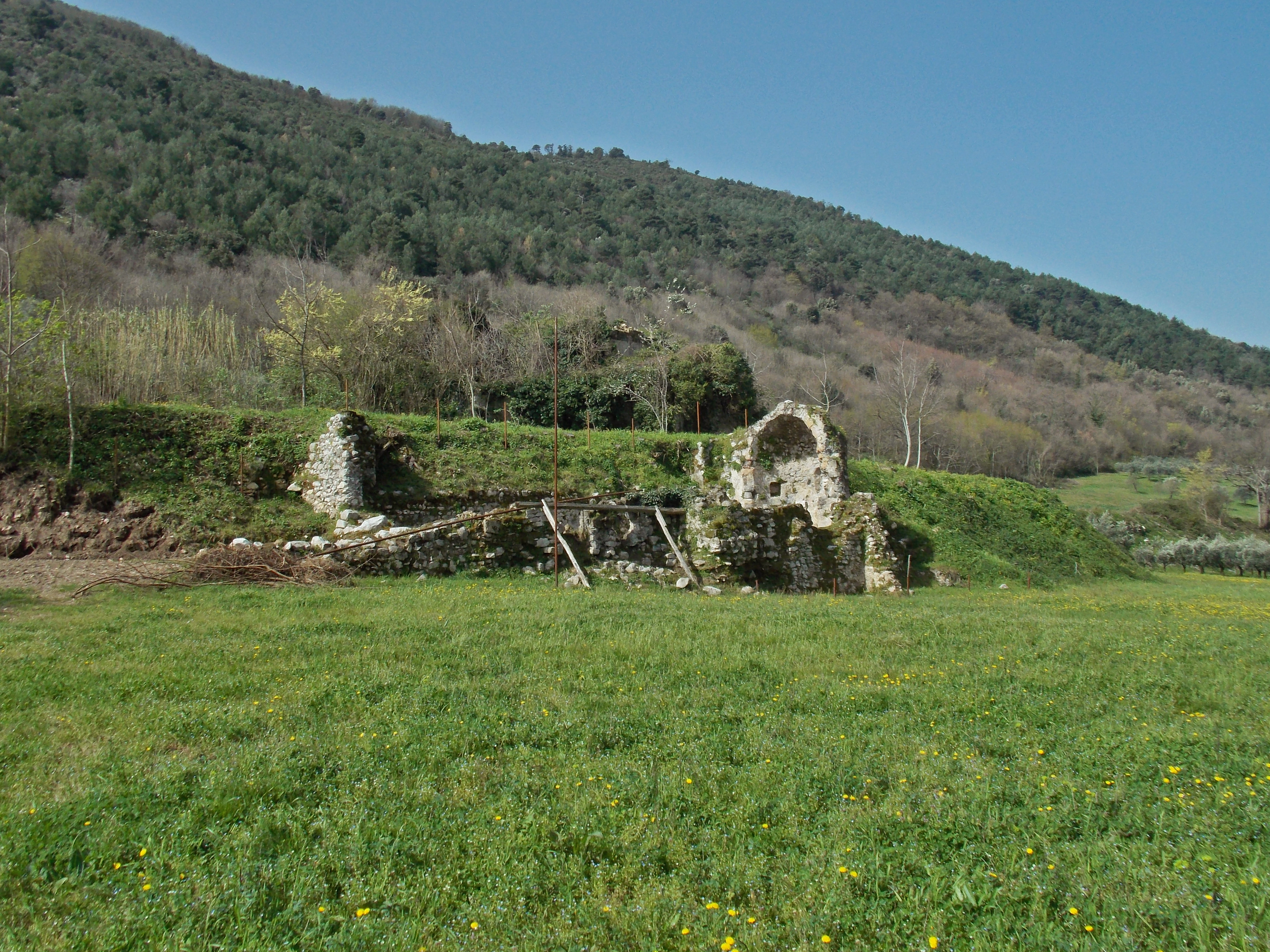 I ruderi della chiesa altomedievale di San Pietro a Massa di Faicchio (BN)